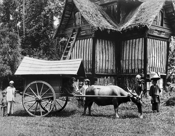 Foto. Een Minangkabause rijstschuur en een ossenkar te Batipoe, Padangse Bovenlanden, Sumatra`s Westkust